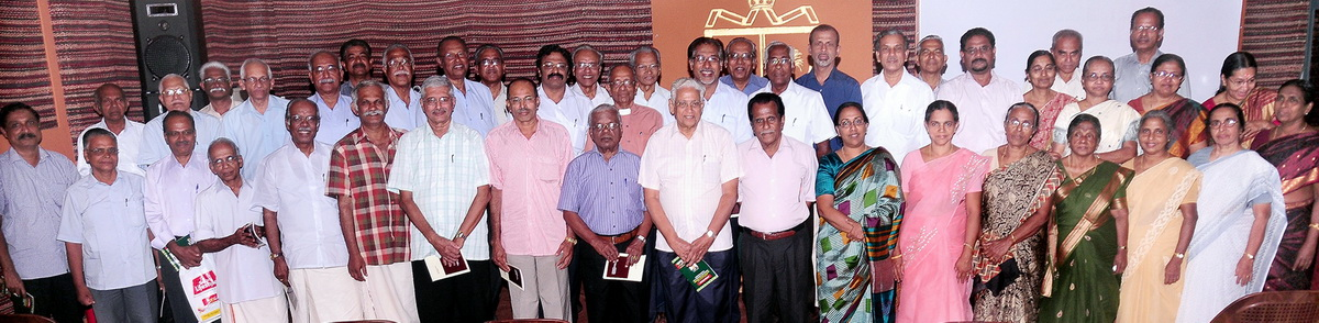 bishop moore retired staff